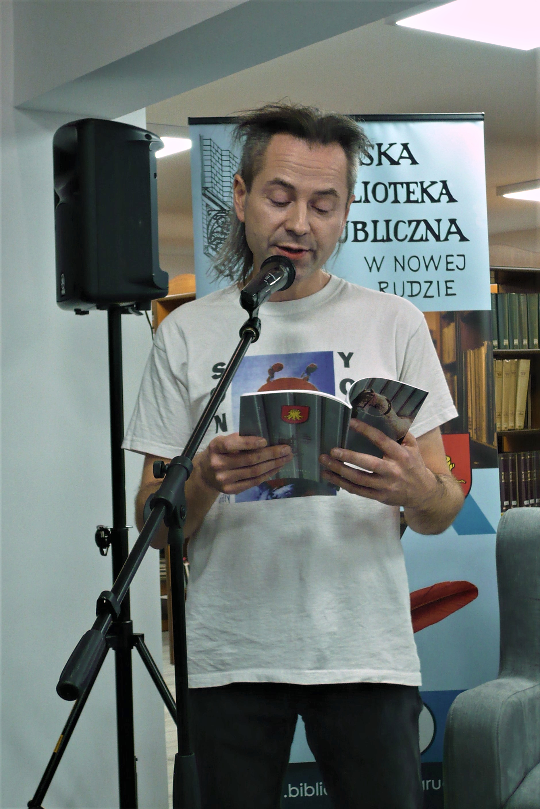 Mirosław Gabryś, Noworudzkie Spotkania z Poezją, 23.11.19